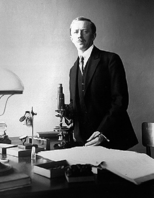 Stanisław Doktorowicz-Hrebnicki (1888-1974) – polski geolog oraz inżynier górniczy